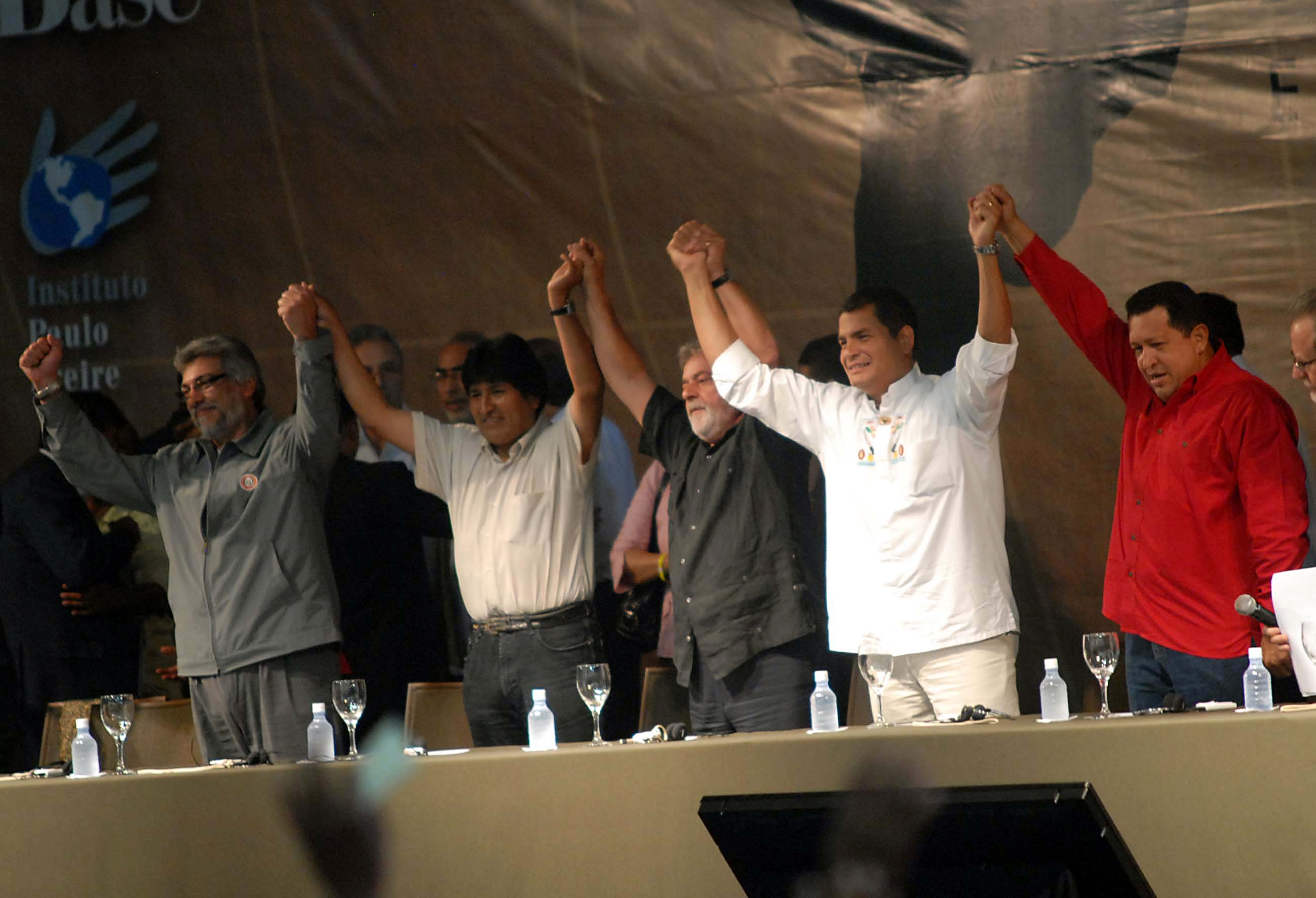 Os presidentes do Paraguai, Fernando Lugo, da Bolívia, Evo Morales, do Brasil, Luiz Inácio Lula da Silva, do Equador, Rafael Correa, e da Venezuela, Hugo Chavez, participam com integrantes do Fórum Social Mundial do painel América Latina e o Desafio da Crise Internacional